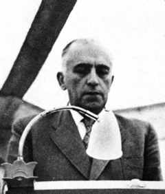 Jan van Rijckenborgh, rosicrucien hollandais, cofondateur de l'École de la Rose-Croix d'Or. Licensing Photo personnelle d'un membre, donnée pour Wikipédia. 2005.